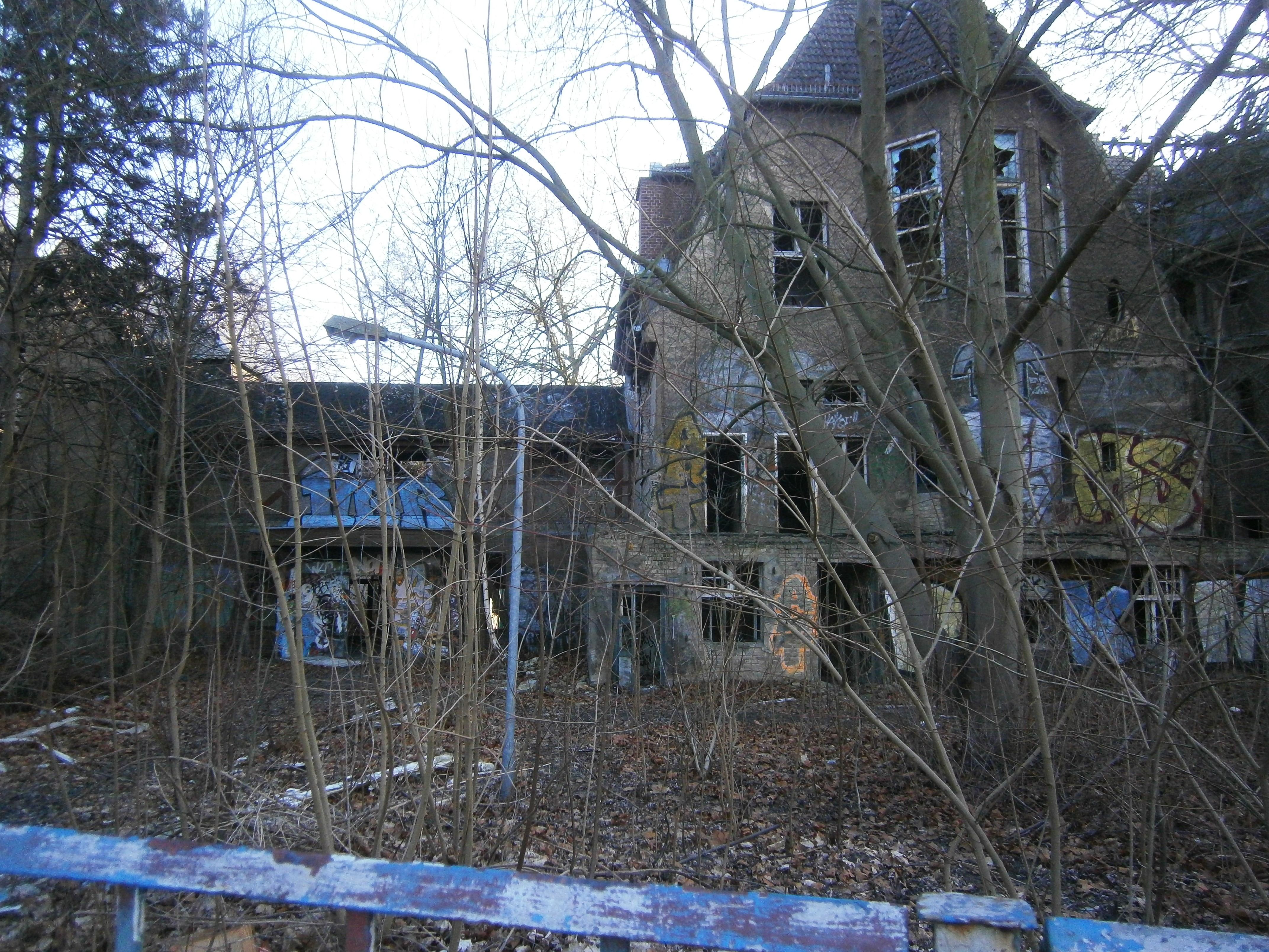 Die Hansastraße ist eine Berliner Straße mit übergeordneter Bedeutung in den Ortsteilen Alt-Hohenschönhausen und Weißensee. Sie liegt zwischen der Indira-Gandhi-Straße und der Großsiedlung Hohenschönhausen-Nord. Im Bild die Ruine des seit dem 1. Januar 1997 stillgelegten Kinderkrankenhauses. 1911 als Gemeindesäuglingskrankenhaus eröffnet - ist es seit 1997 dem Leerstand und seit 2005 dem Nichtstun der Investoren zum Opfer gefallen.